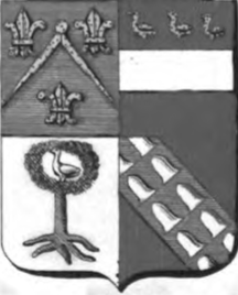 Armes de la famille de Schrynmakers de Dormael